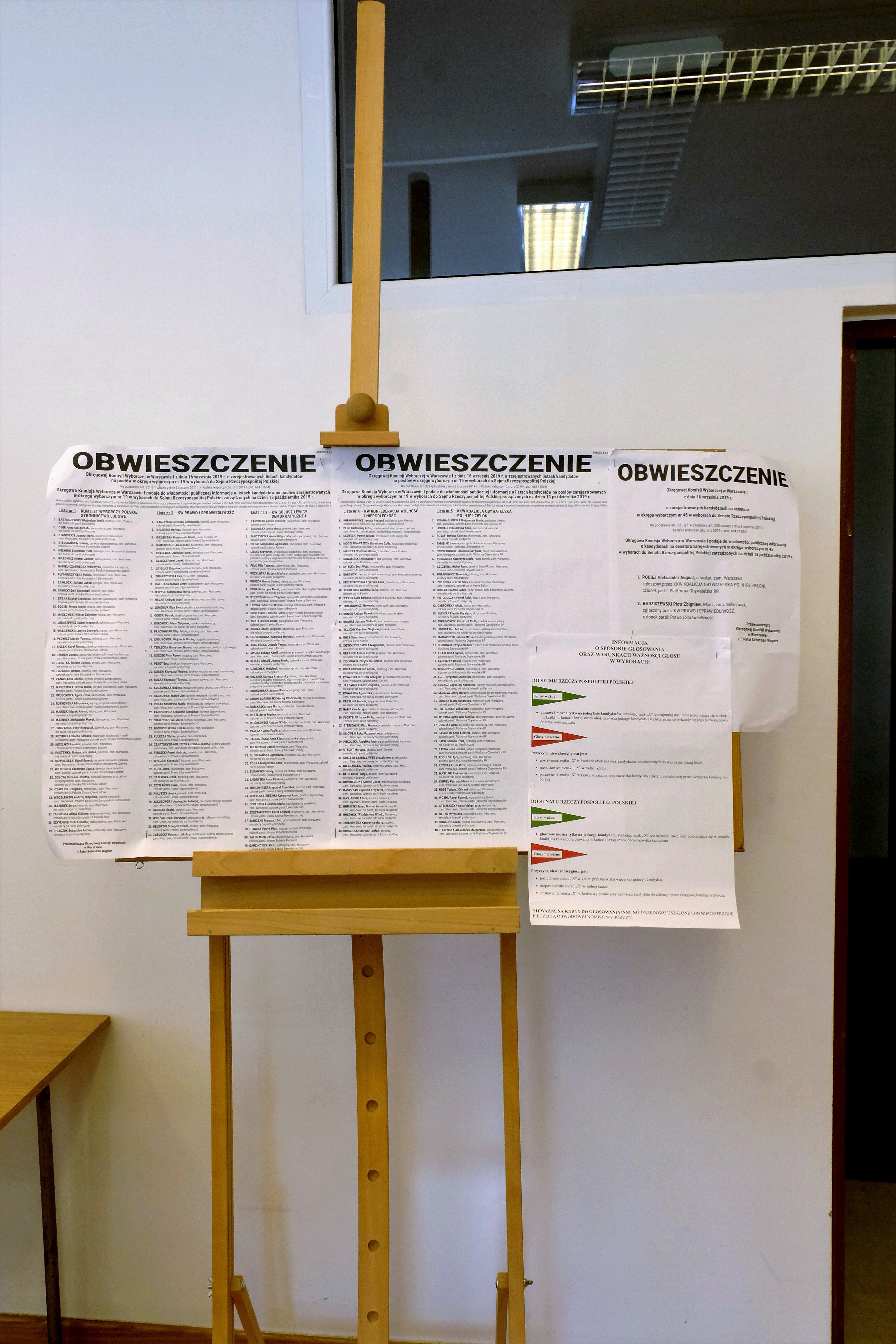 Wybory parlamentarne w Polsce w 2019; państwowa obwodowa komisja wyborcza w gmachu Zespołu Państwowych Szkół Plastycznych im. Wojciecha Gersona w Warszawie (obwieszczenie wyborcze)